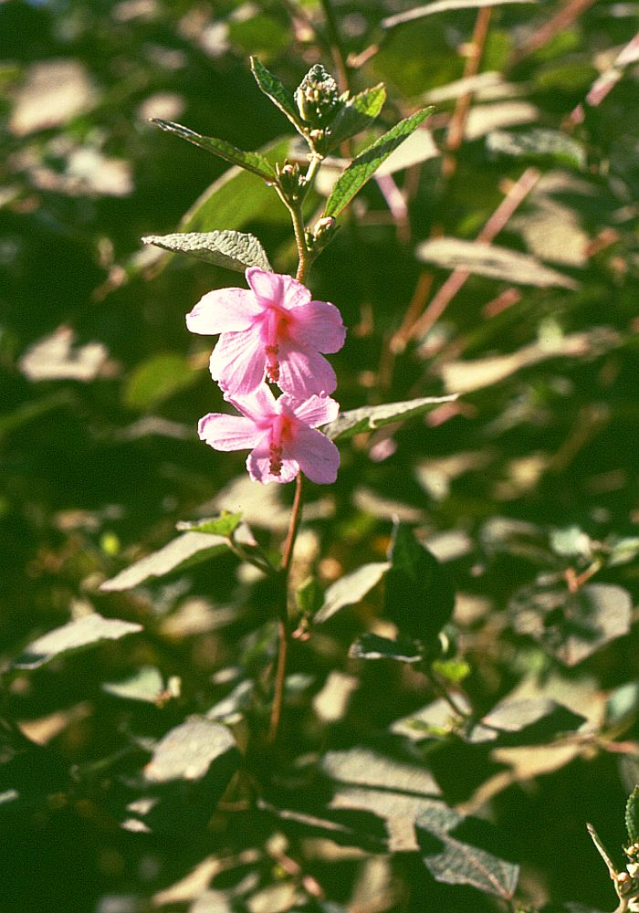 Urena lobata, Malvengewächse (Malvaceae) - Kambodscha/Cambodia, N Ban Lung (Prov. Ratanakkiri)